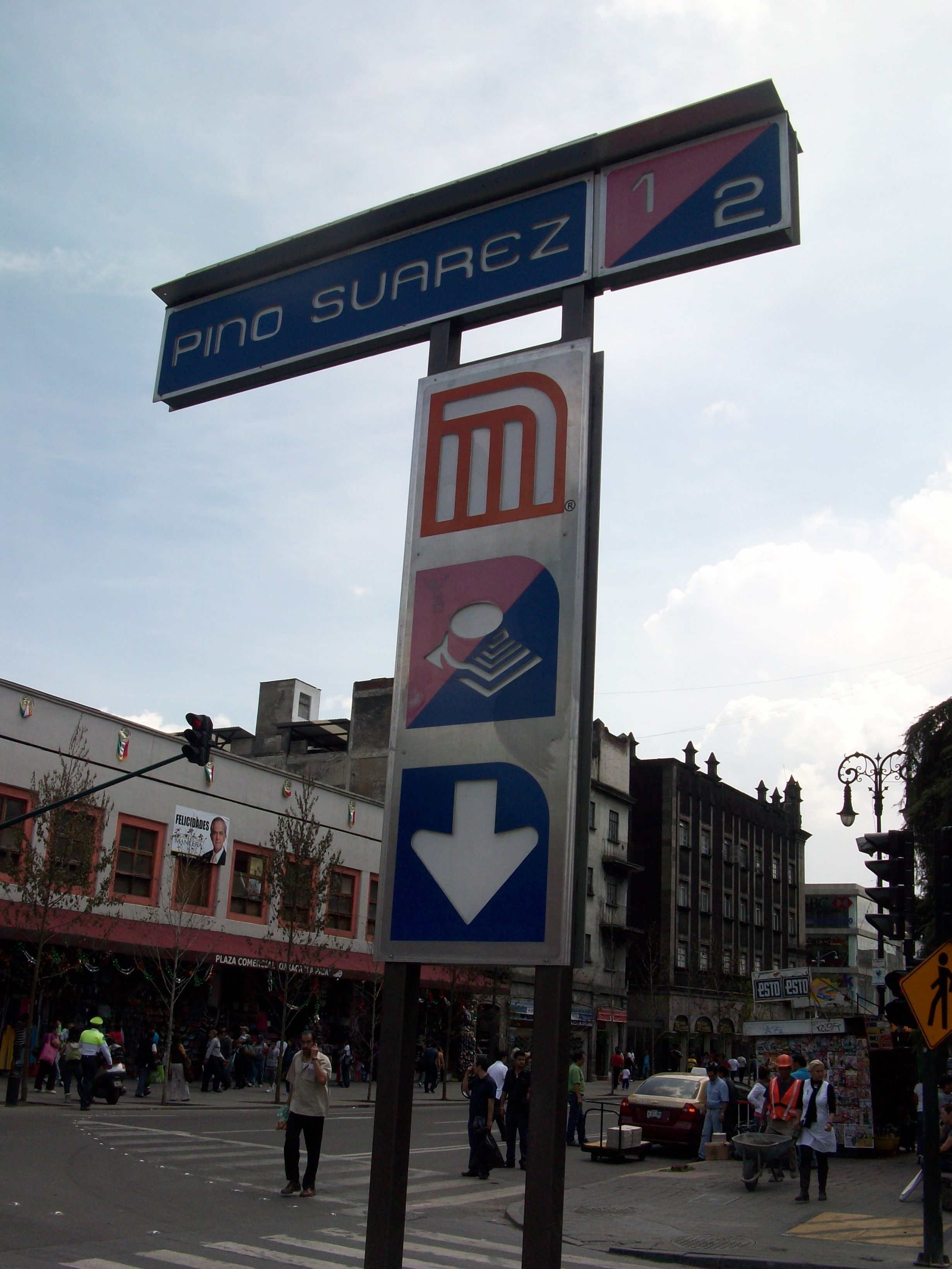 Estela Pino Suarez